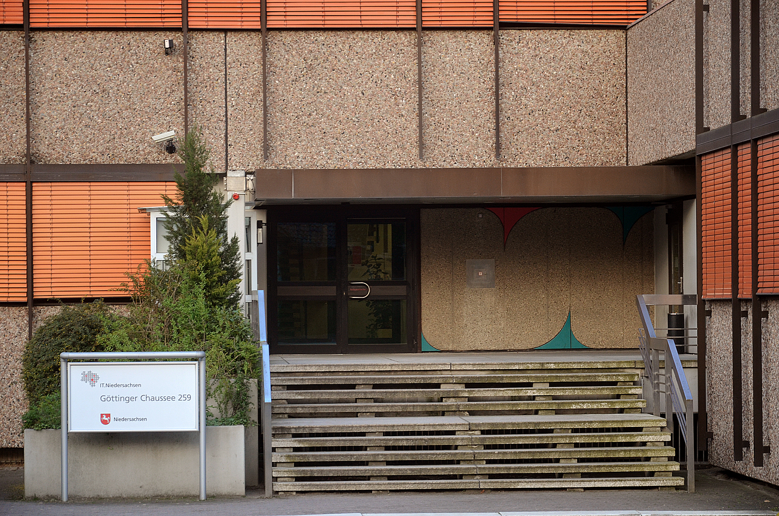 Ein Eingang zum Landesbetrieb IT.Niedersachsen an der Göttinger Chaussee 259 in 3459 Hannover-Ricklingen...